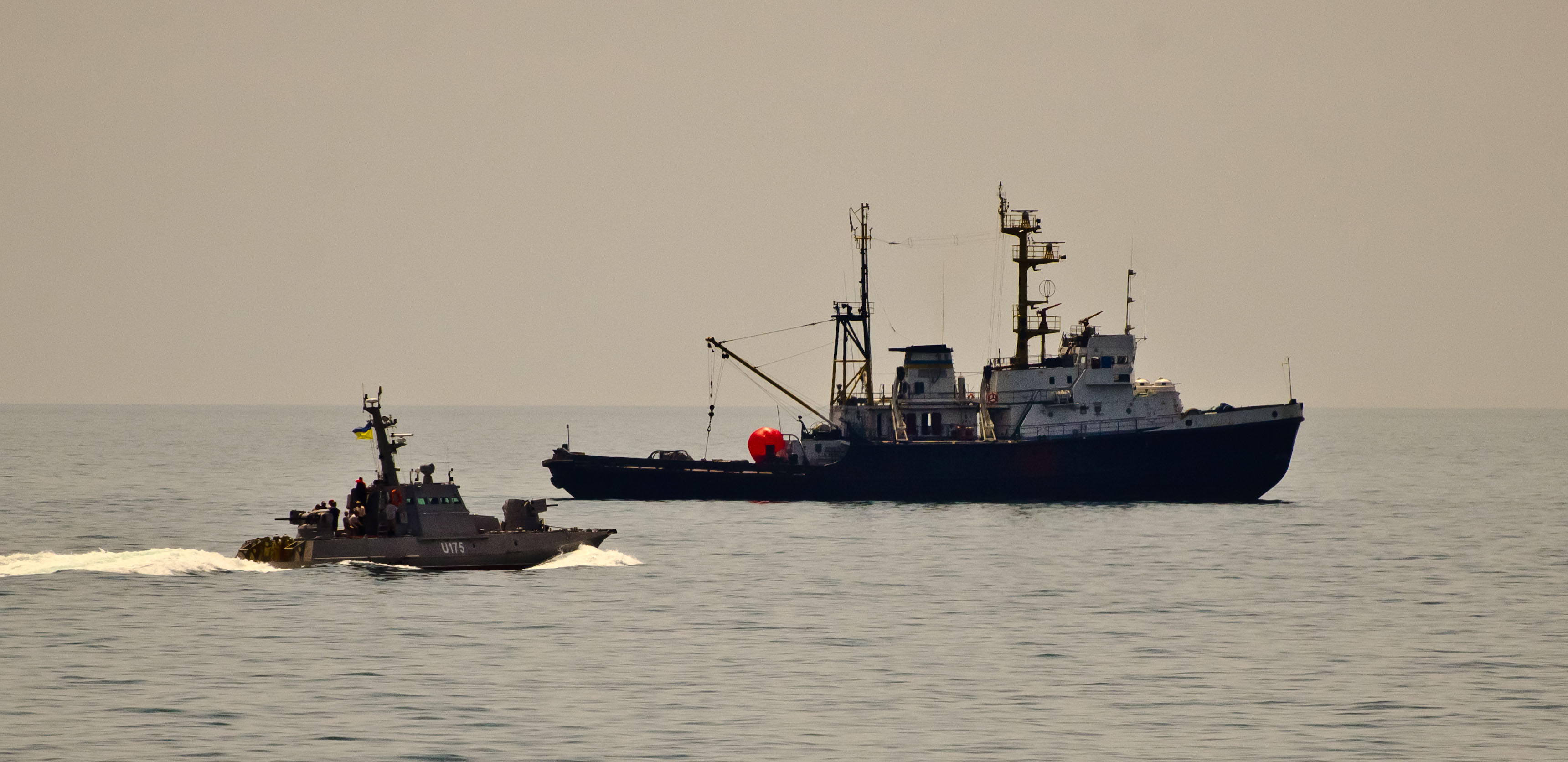 Швидкий хід та потужна зброя бронекатеру "Аккерман" (U-175) ) - запорука оборони узбережжя Маріуполя. Державні іспити та ходові випробування в морі тривають. Два новозбудовані для Військово-Морських Сил Збройних Сил України малі броньовані артилерійські катери в ході випробувань у відкритому морі здійснили спільне плавання. Під час виходу у складі тактичної групи катерів перевірено роботу систем і механізмів у штормових умовах. Матеріальна частина працювала в штатному режимі. Фото: Євген Силкін